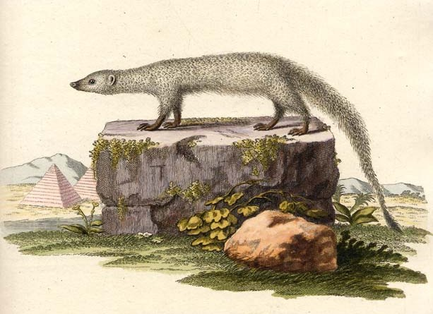 Herpestes ichneumon, plate from Schreber, Johann Christian Daniel von, Histoire naturelle des quadrupèdes représentés d´après nature. Tome III. Le phoque, le chien, le chat, le putois, la loutre, la marte, l'ours, le didelphe, la taupe, la souris, le hérisson A Erlang, chez Wolfgang Walther, 1780